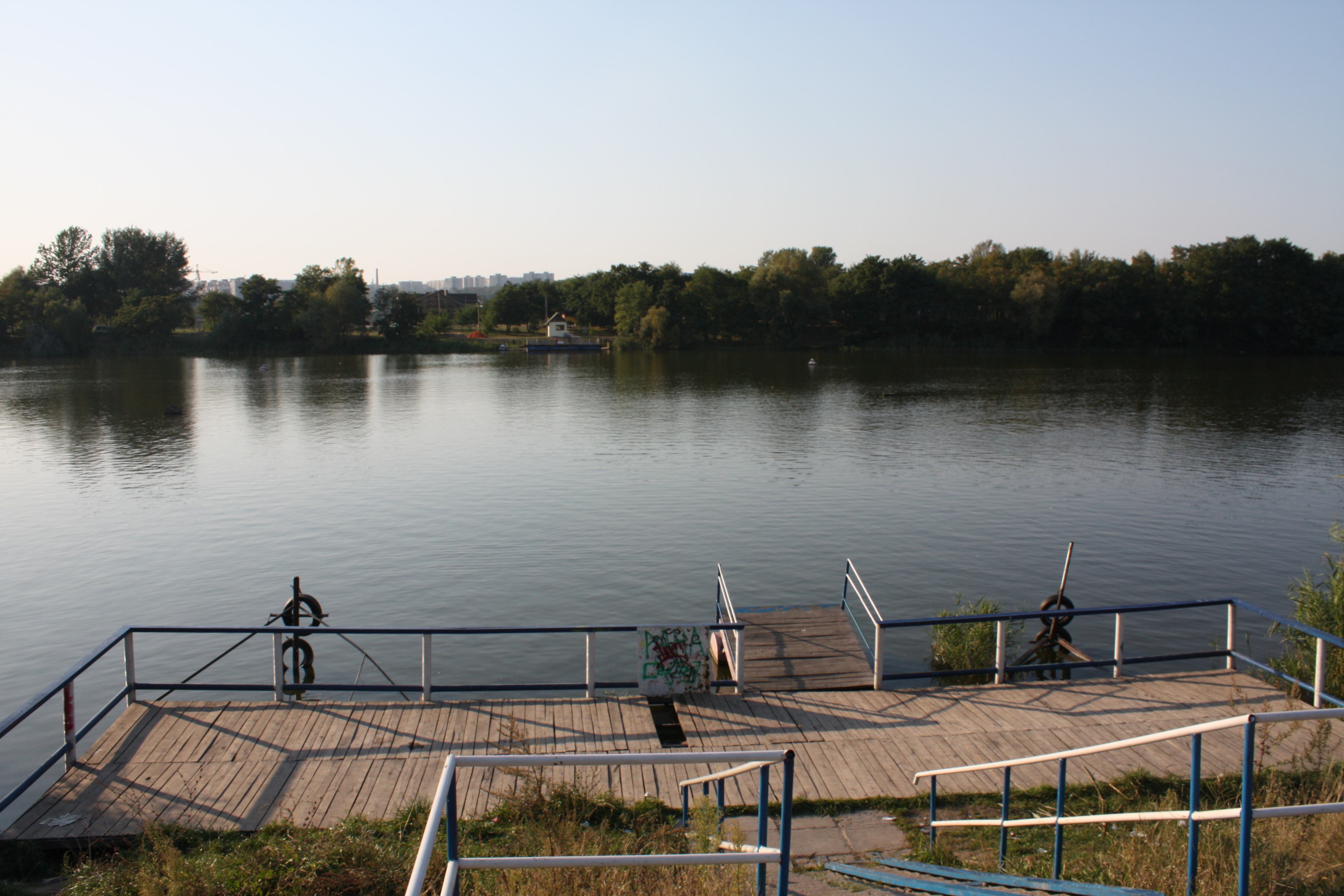 A guif (ferry) of Kharkov river, Sands region, Saltovka. Гребной канал в Харькове. Вид с левого берега от микрорайон Пески (Салтовка) на полуостров Сосновый Бор между каналом и рекой Харьков. Впереди причал несамоходного понтон-парома, на другом берегу сам паром (работает летом). На горизонте высотные дома Шишковки